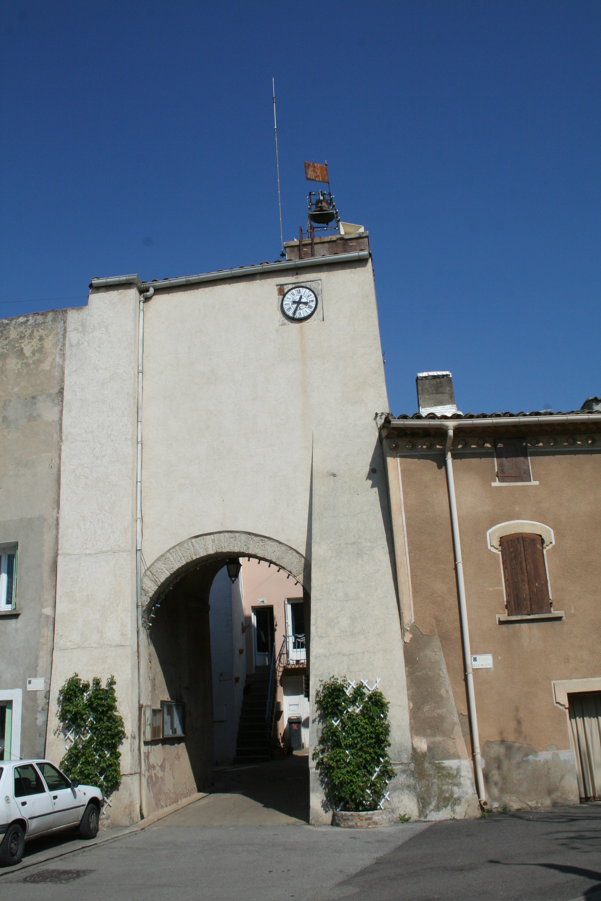 Saint-Bauzille-de-la-Sylve (Hérault - porte du village.